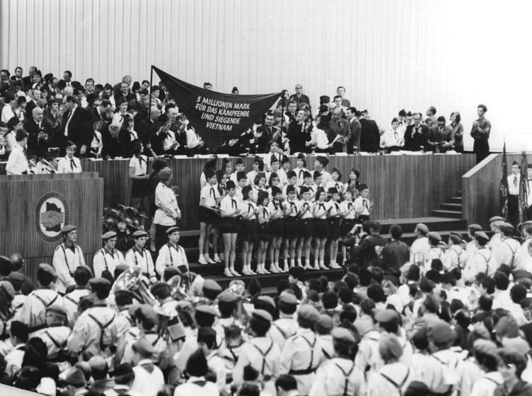 ADN-ZB Kollektiv 19-6-71-ba Berlin: VIII. Parteitag der SED - letzter Beratungstag (19.6.)- Hunderte Mädchen und Jungen der Pionierorganisation "Ernst Thälmann" grüßten heute (19.6.) in der Berliner Werner-Seelenbinder-Halle die Delegierten und Gäste des VIII. Parteitages der SED. Eine der hervorragenden Leistungen mit der die Pioniere zum Parteitag stolz aufwarten können: Sie sammelten fünf Millionen Mark für das kämpfende und siegende Vietnam. (VIII-C) Rep.: Koard."